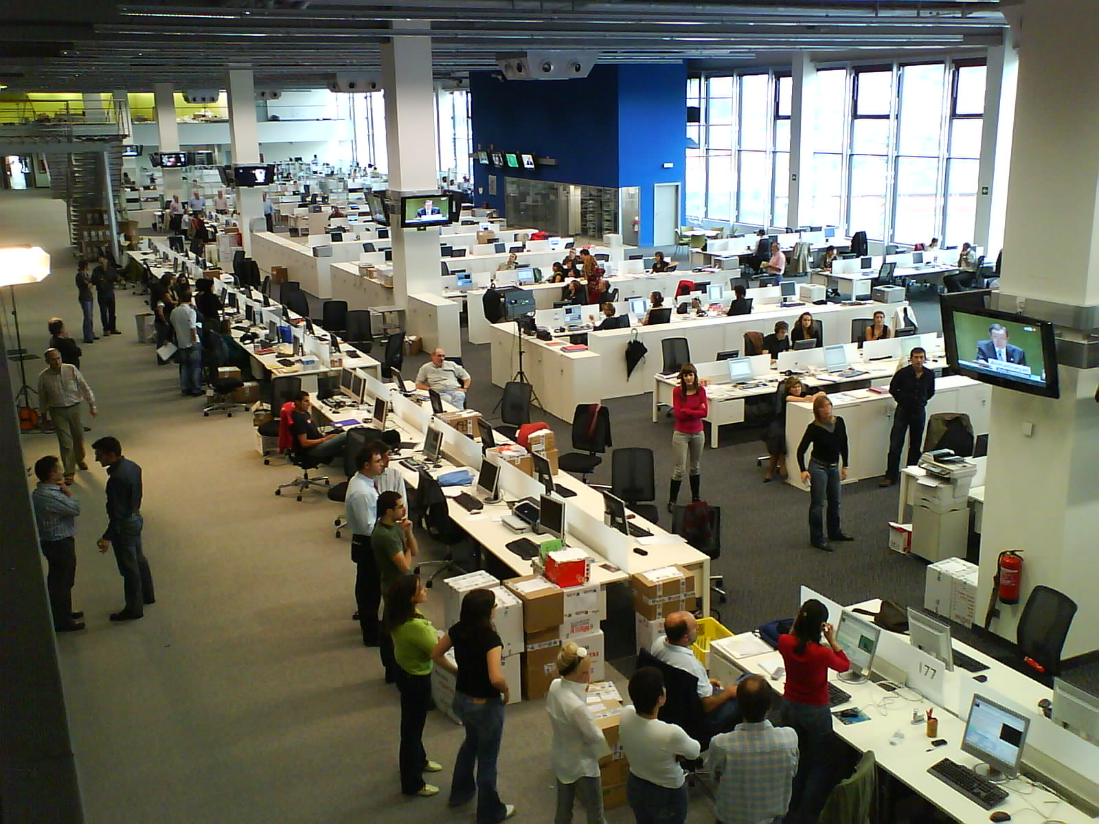 Vista general de la gran sala de redación de la nueva sede de EITB en Bilbao (Vizcaya, País Vasco (España))